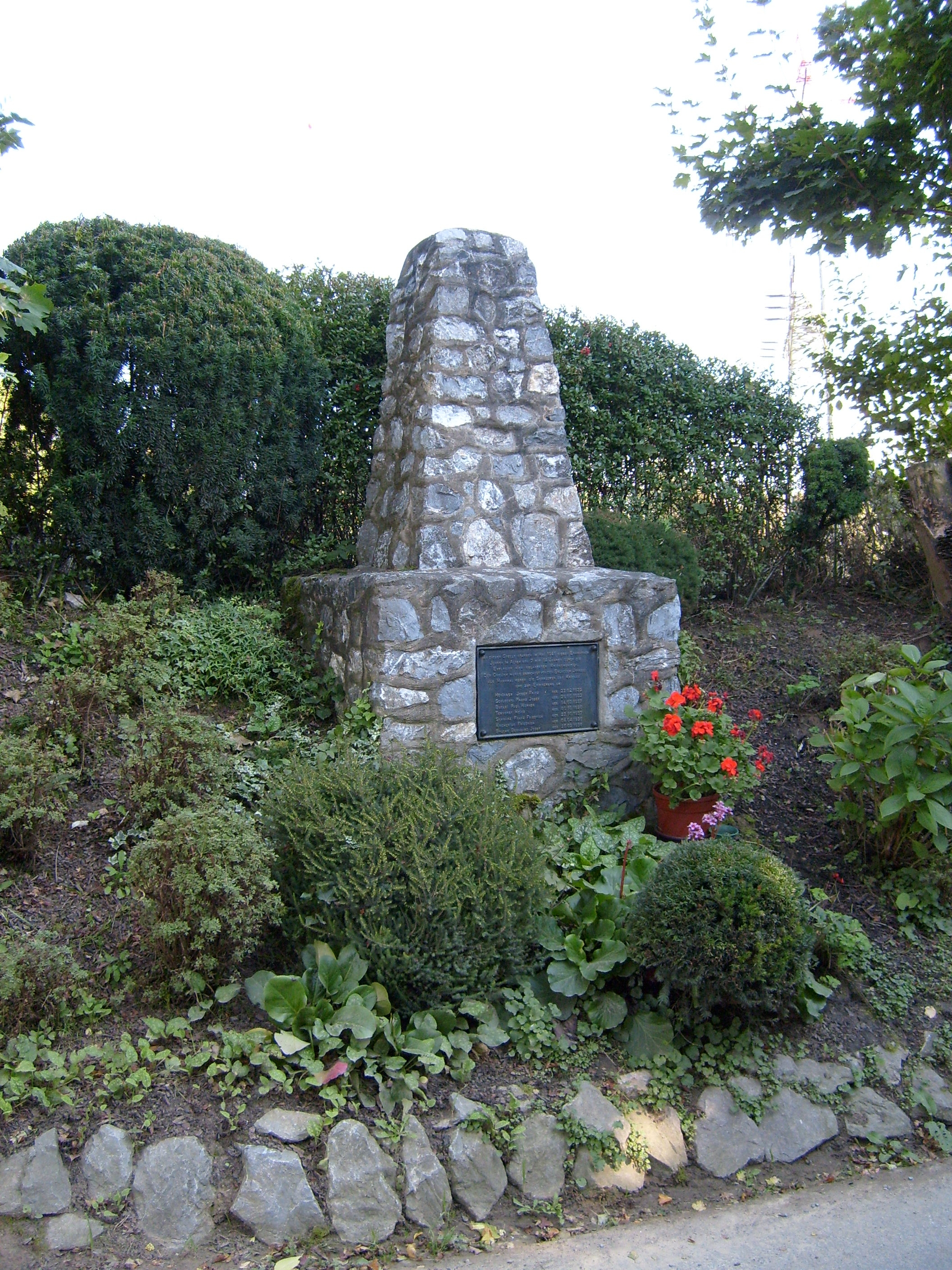 Denkmal oberhalb des Erkrather Nord-Bahnhofes für die sieben 1945 in den Nachkriegstagen beim Spielen an Munitionsresten getöteten Kinder